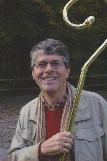 Frits Booy, publicist over Sinterklaas